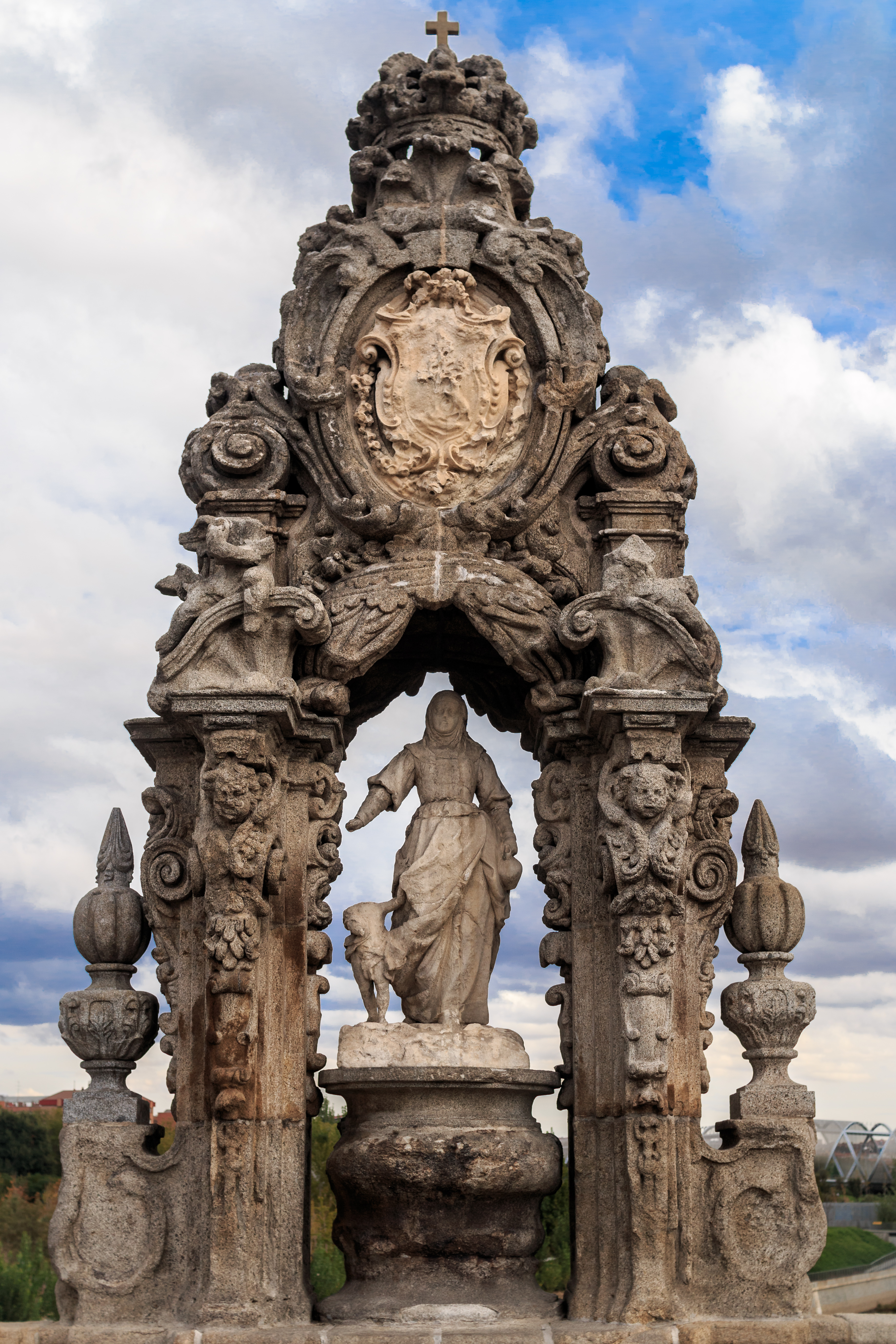 Hornacina con la imagen de Santa María de la Cabeza sobre el puente de Toledo, Madrid.